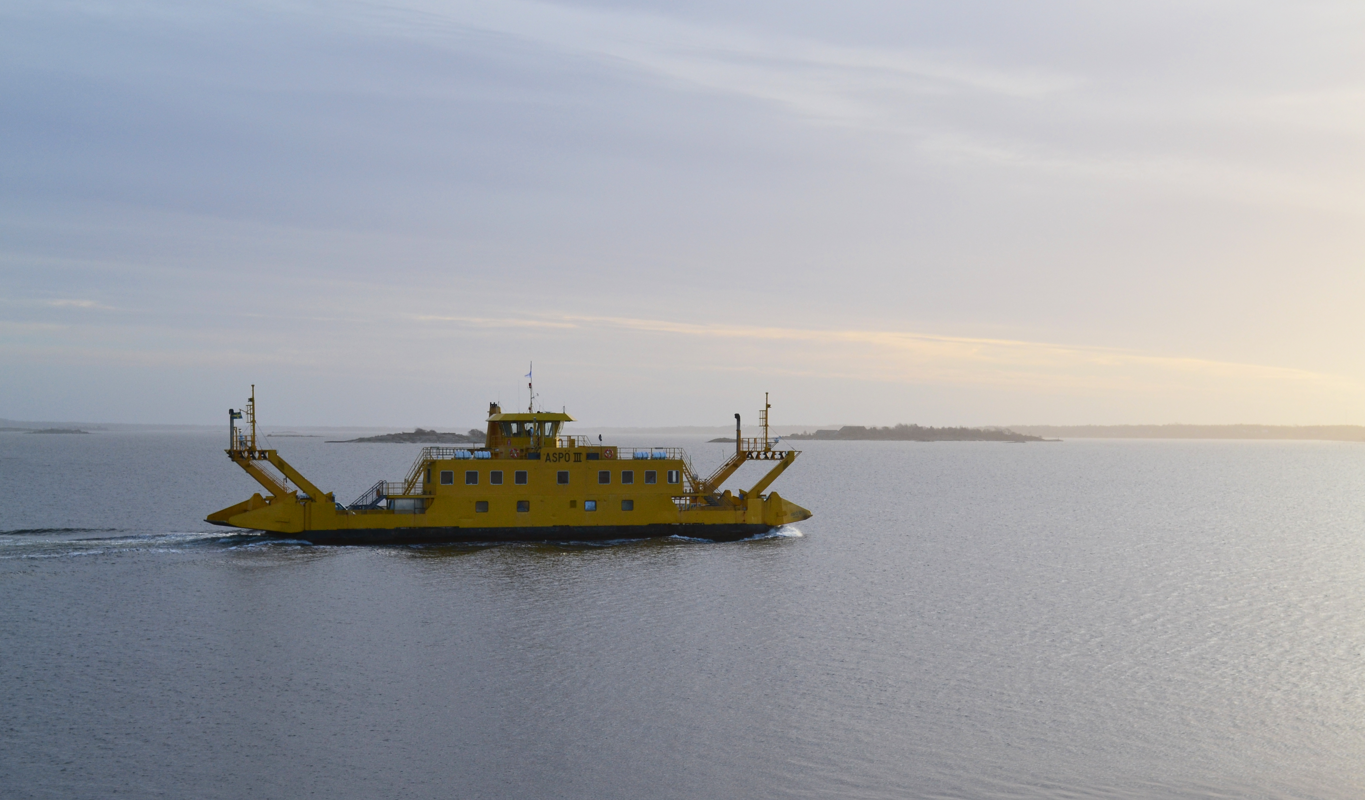 Aspö III, en av tre bilfärjor som går mellan Trossö och Aspö flera gånger om dagen.